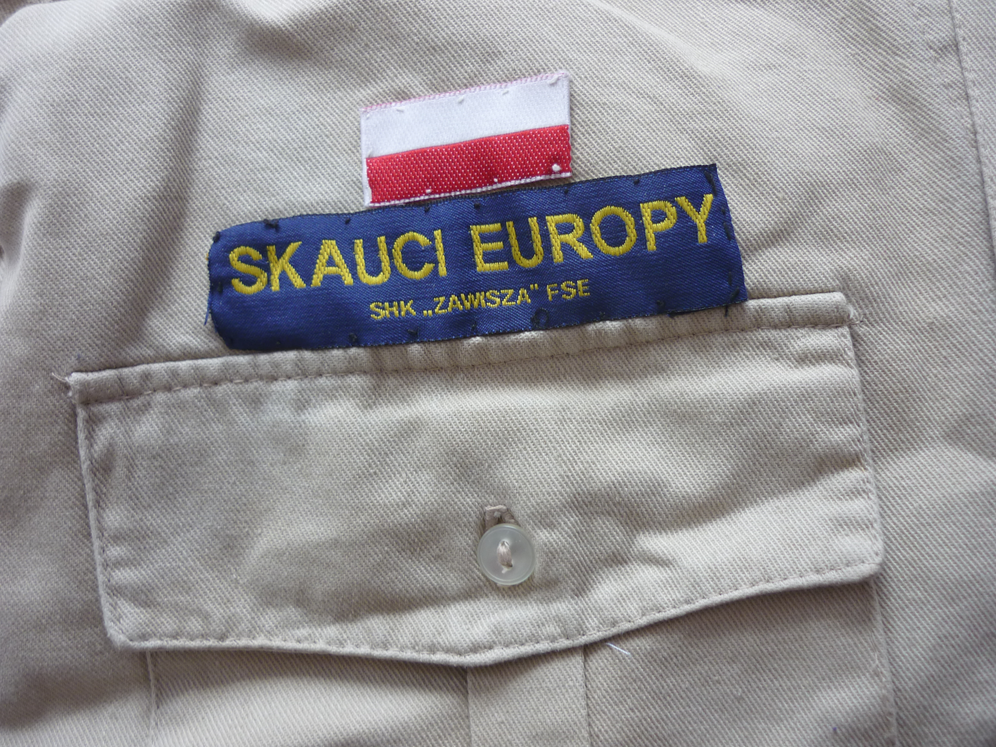 Naszywka Skauci Europy nad prawą kieszenią na mundurze męskim Stowarzyszenia Harcerstwa Katolickiego "Zawisza"